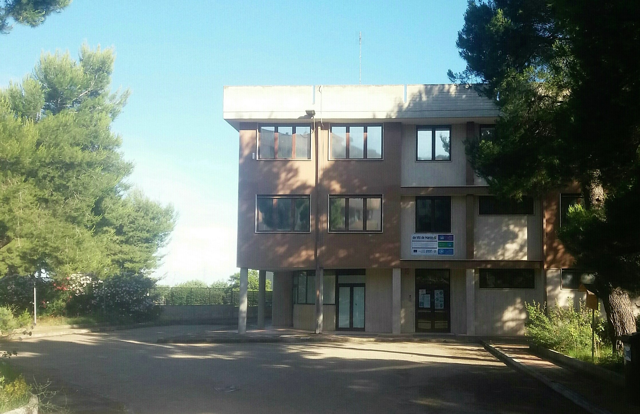 sede centrale de Vti de Marco